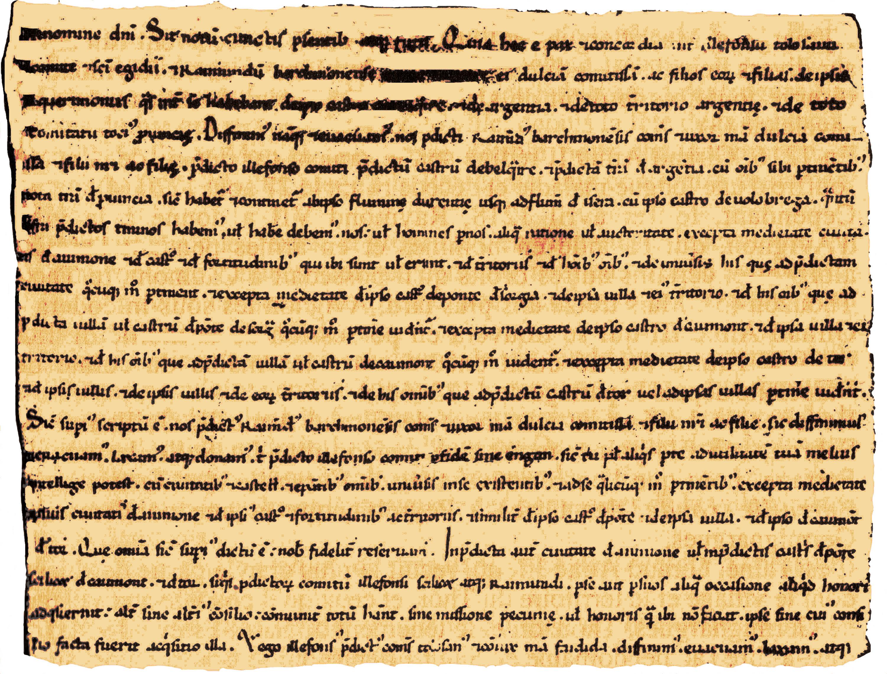 Acte de partage de la Provence entre Toulouse et Barcelone 1125 Archives départementales B-du-Rh B 277